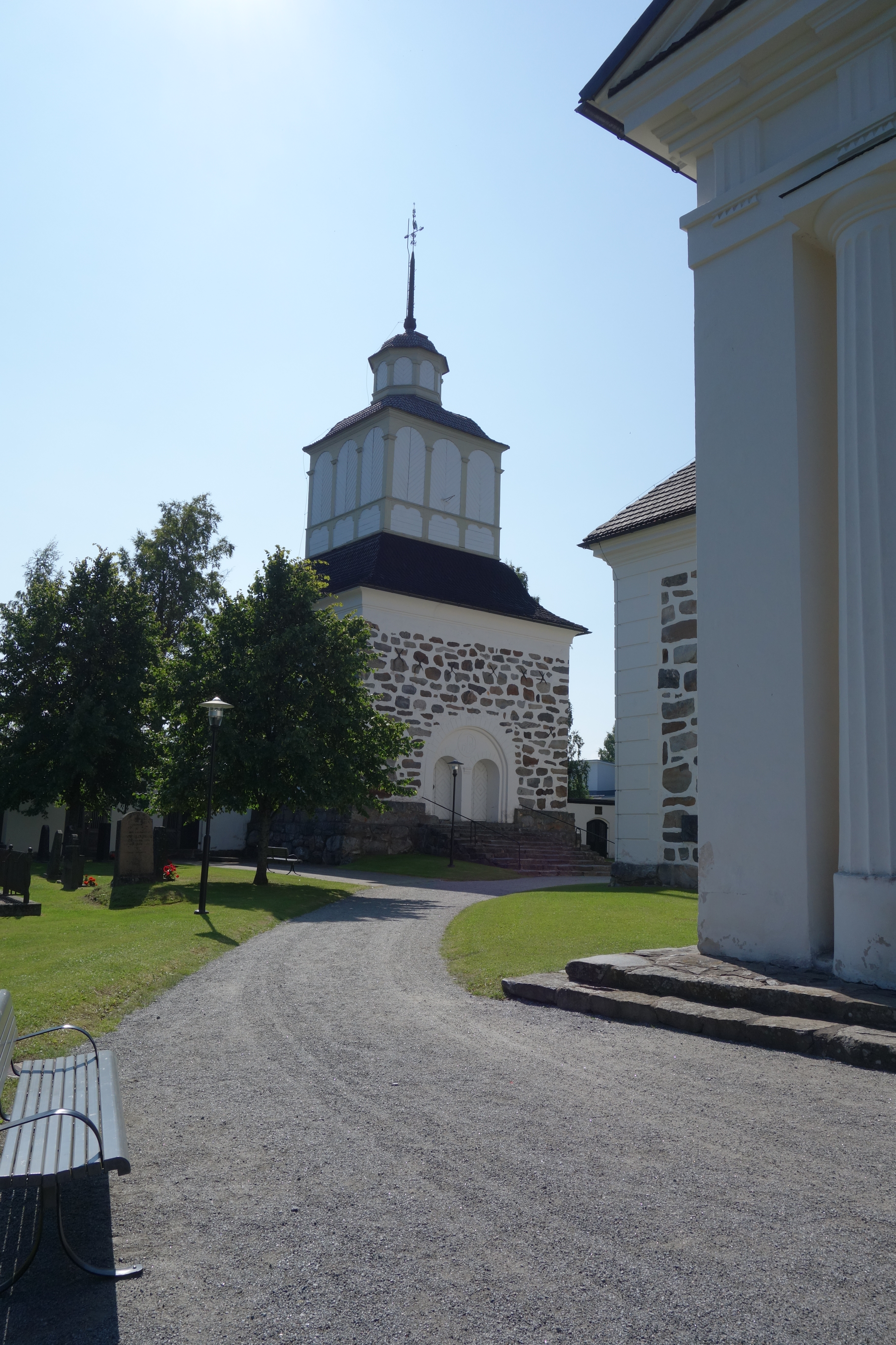 Klockstapeln ved Pedersöre kyrka, Jakobstad, Finland